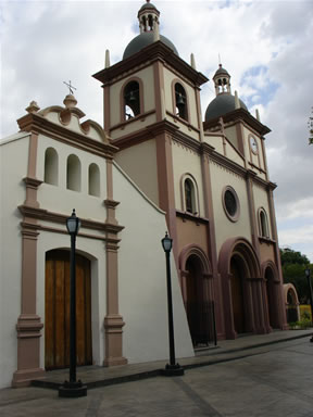 Templos de Naguanagua